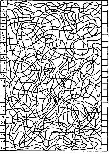 Бланк задания - стимульный материал для теста "Перепутанные линии"